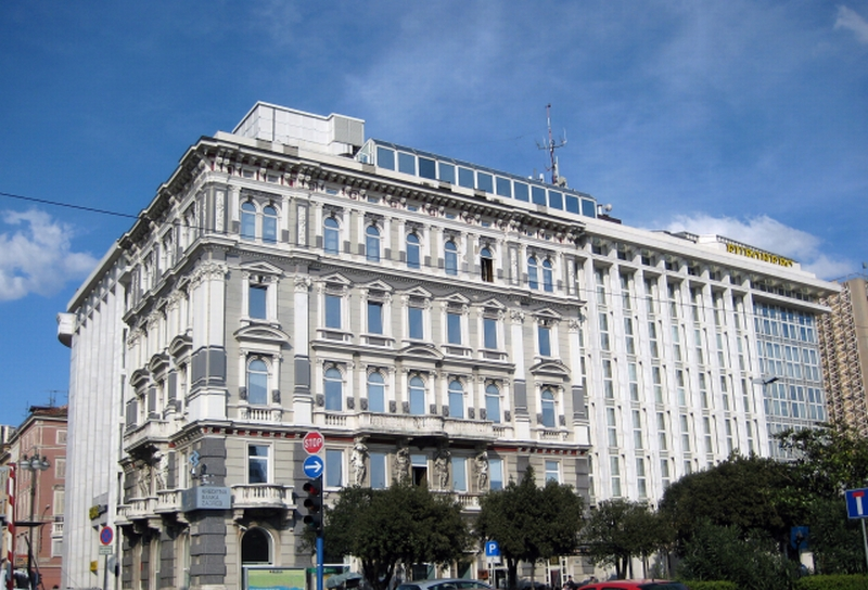 zgrada Euroherca, bivšeg Croatia-Linea, Rijeka